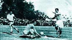 ישראל מול מצרים במוקדמות מונדיאל 1934